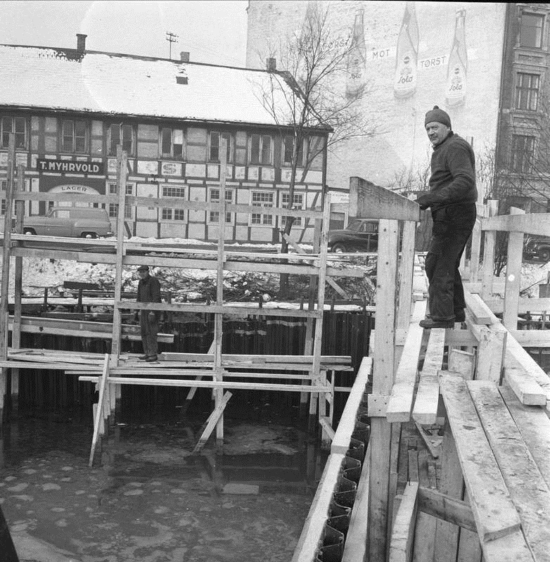 Schweigaards bru, Oslo, 23.02.1956. Anleggsarbeid. Bebyggelse og elva, mann på stilaser. Bindingsverksbygning i Rødfyllgata 12 under riving, nå på Norsk Folkemuseum. Fra Dagbladets negativarkiv (6 x 6) som Norsk Folkemuseum overtok 2003.